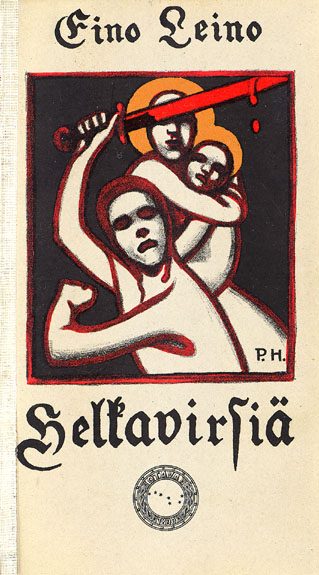 Eino Leino: Helkavirsiä 1903. Kansikuvan suunnitteli Pekka Halonen.